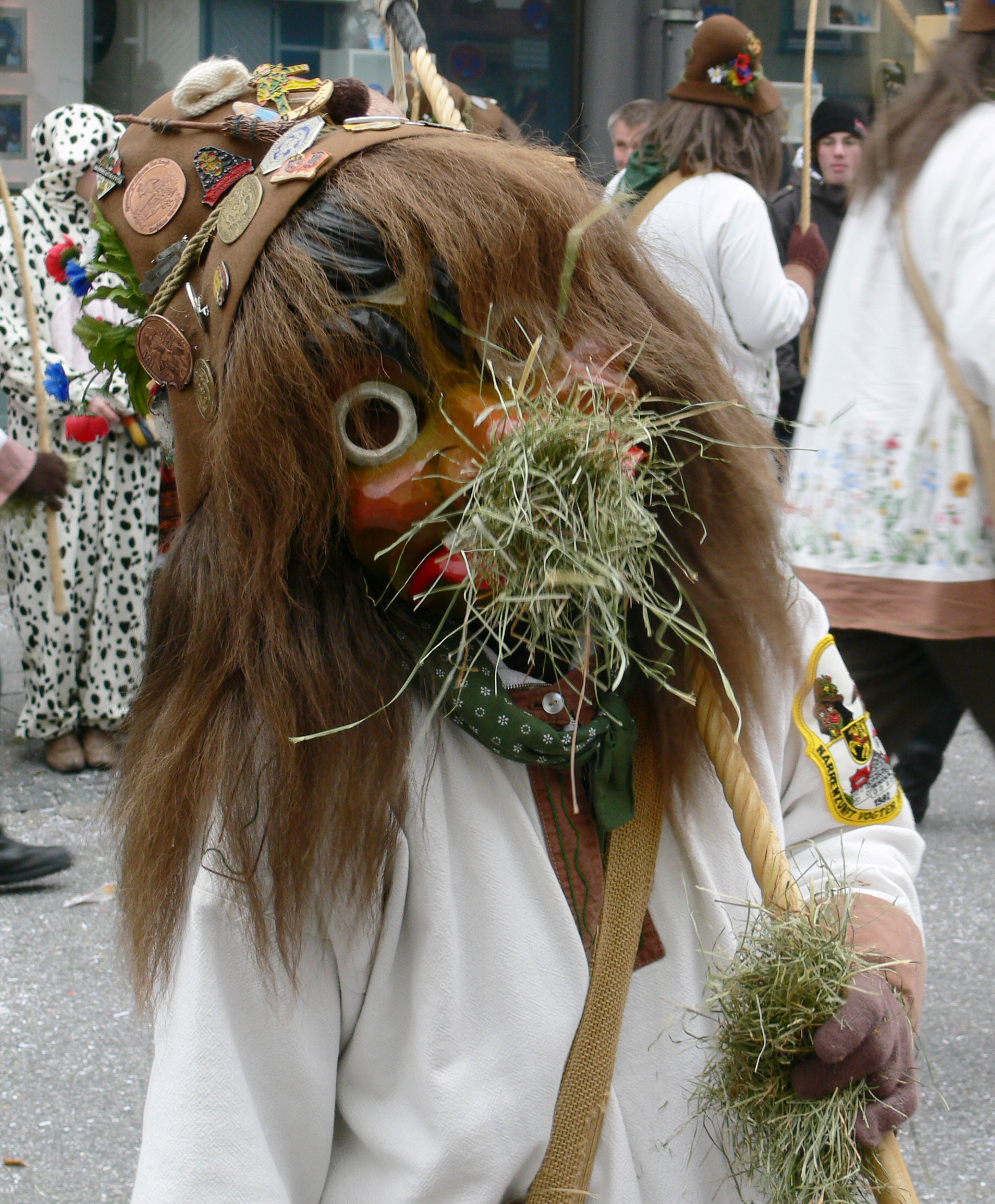 Narrensprung am Fasnetsmontag, 4. Februar 2008 in Ravensburg: Heufresser der Narrenzunft Vogter Heufresser, Vogt